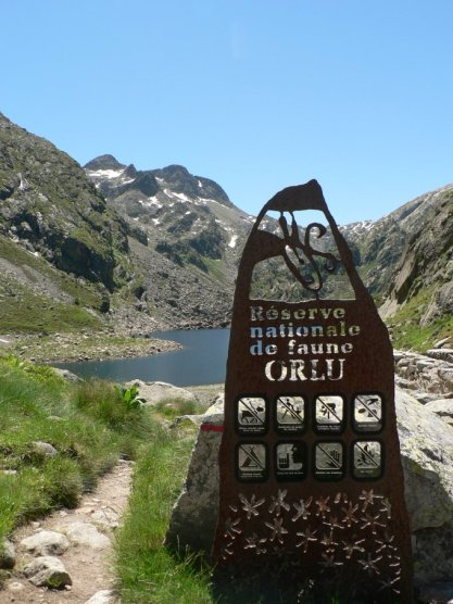 Une borne en fer brut signalisant le sentier d'interprétation de la Réserve Nationale d'Orlu avec au fond le lac d'En Beys.